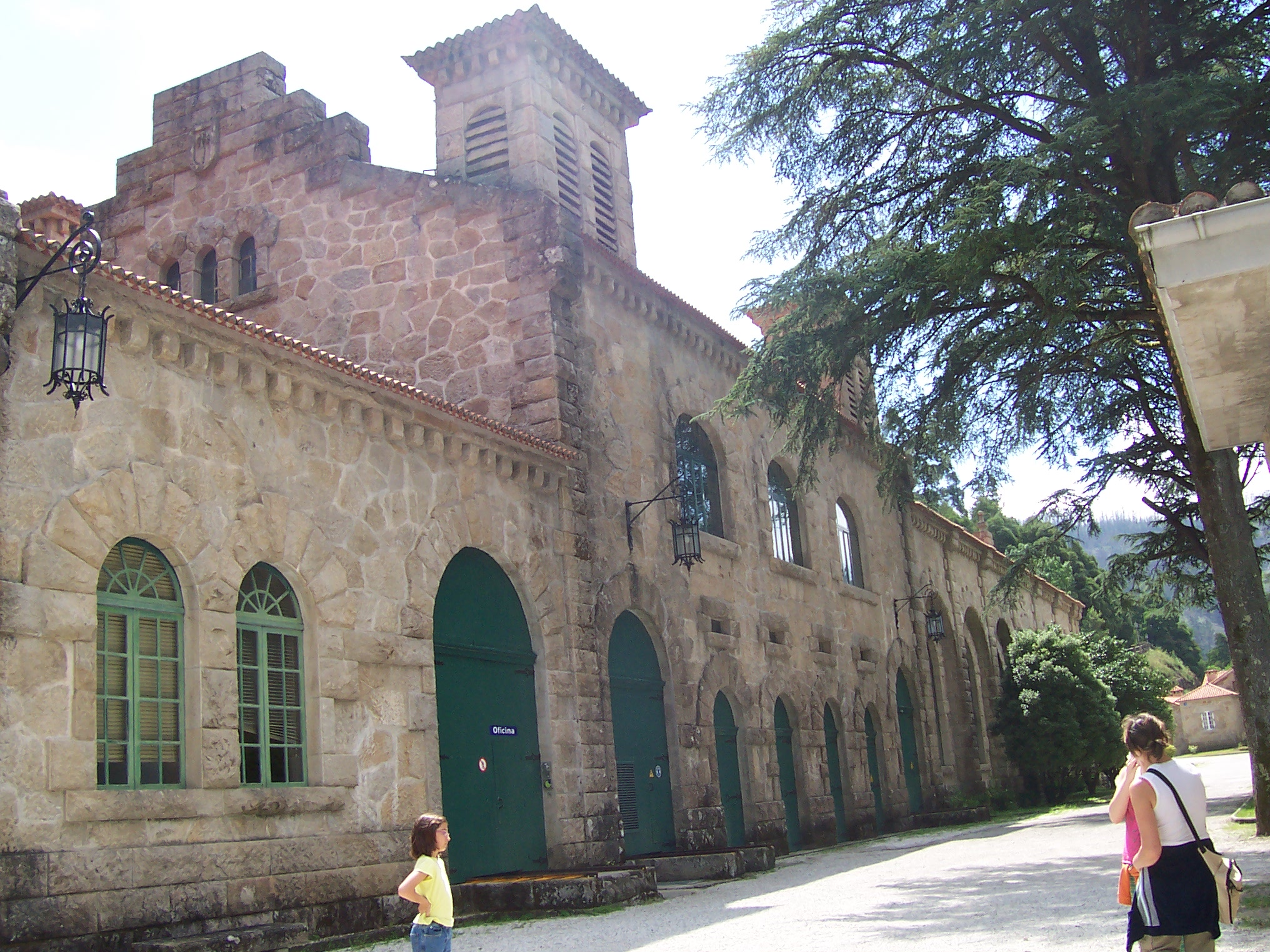 Central hidroeléctrica do Tambre, Noia. Edificio deseñado por Antonio Palacios na década de 1920.